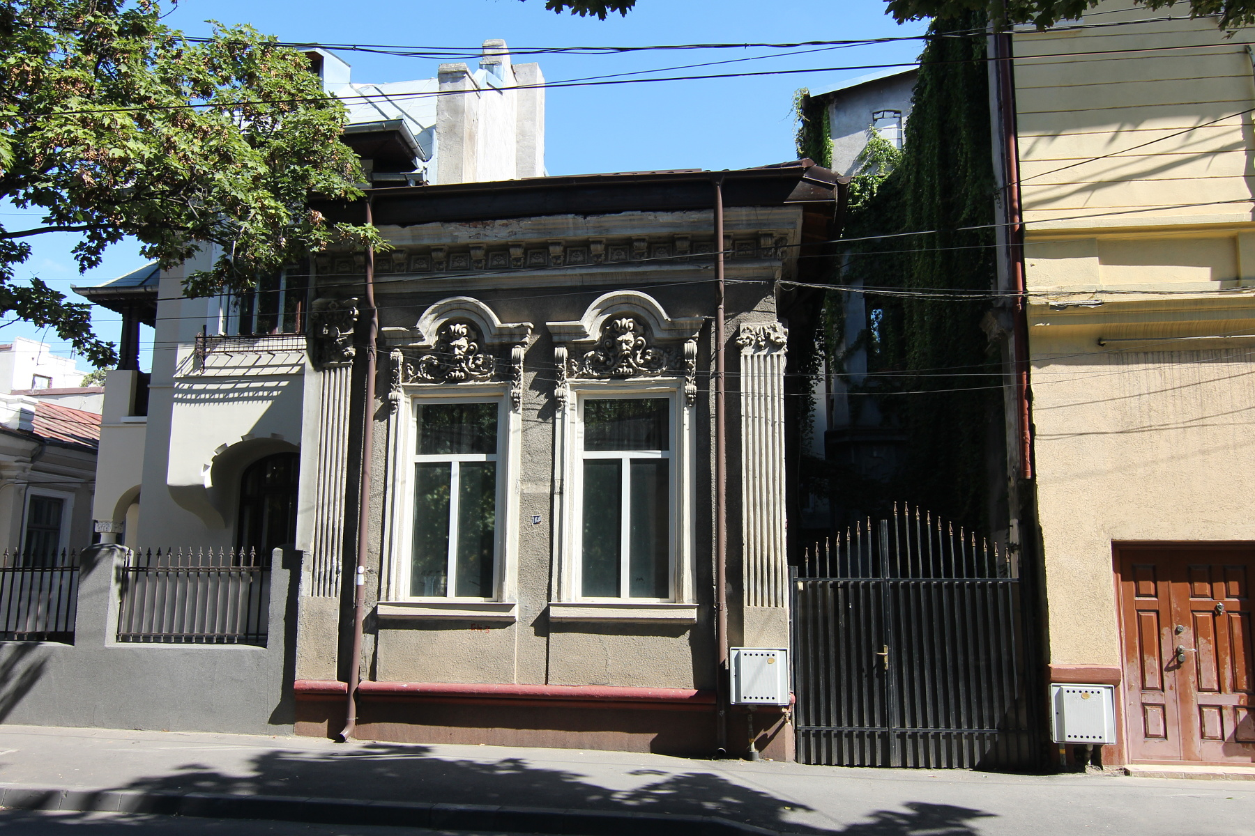 Casă pe strada Traian